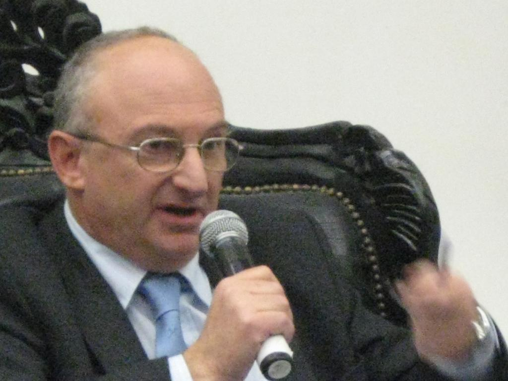 Ahmed Tibi v. Arie Eldad | אחמד טיבי נגד אריה אלדד